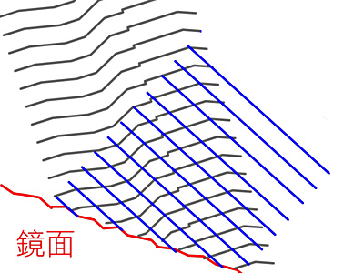 有適應光學